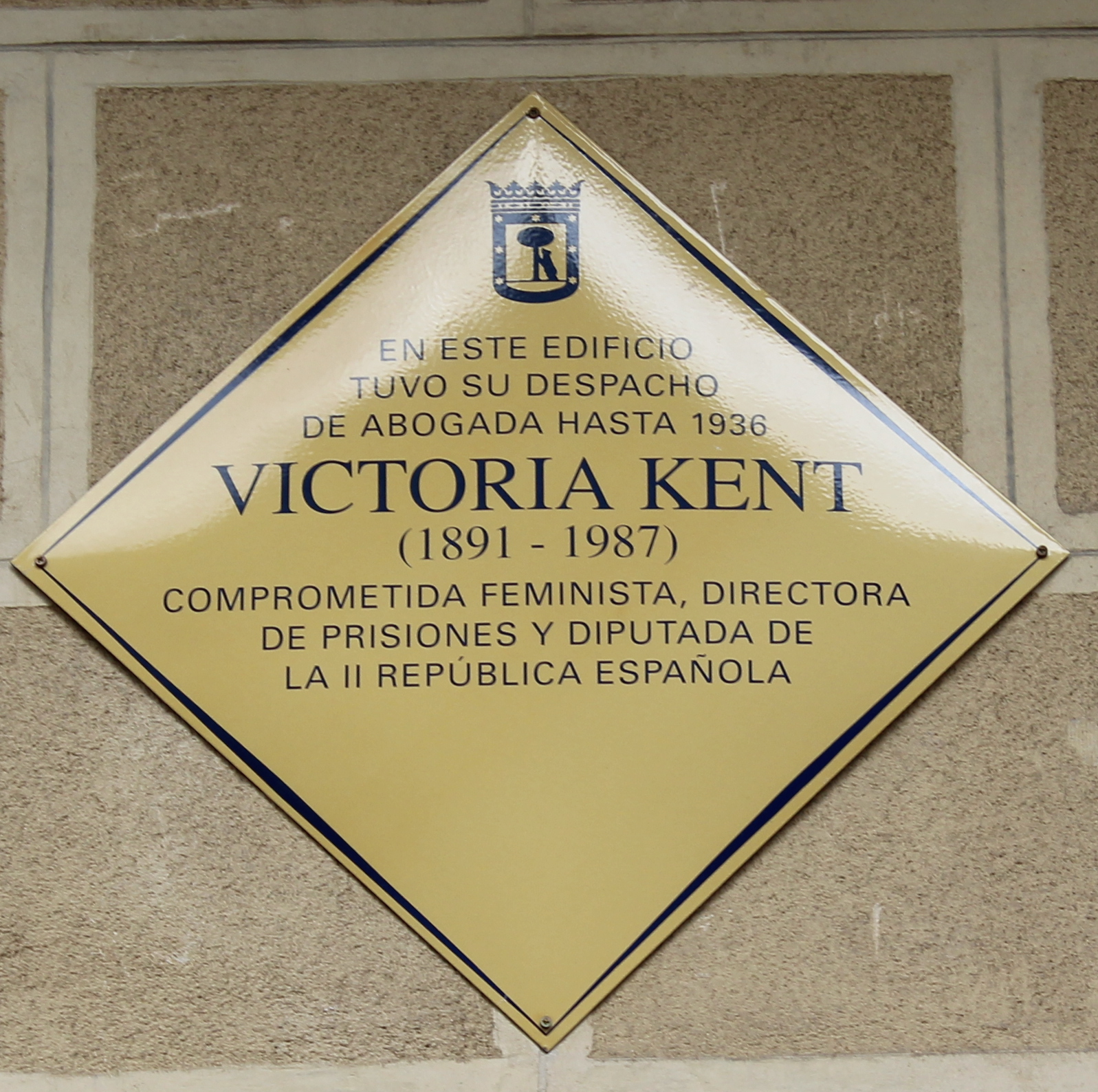 Aquí tuvo su despacho Victoria Kent, Madrid.